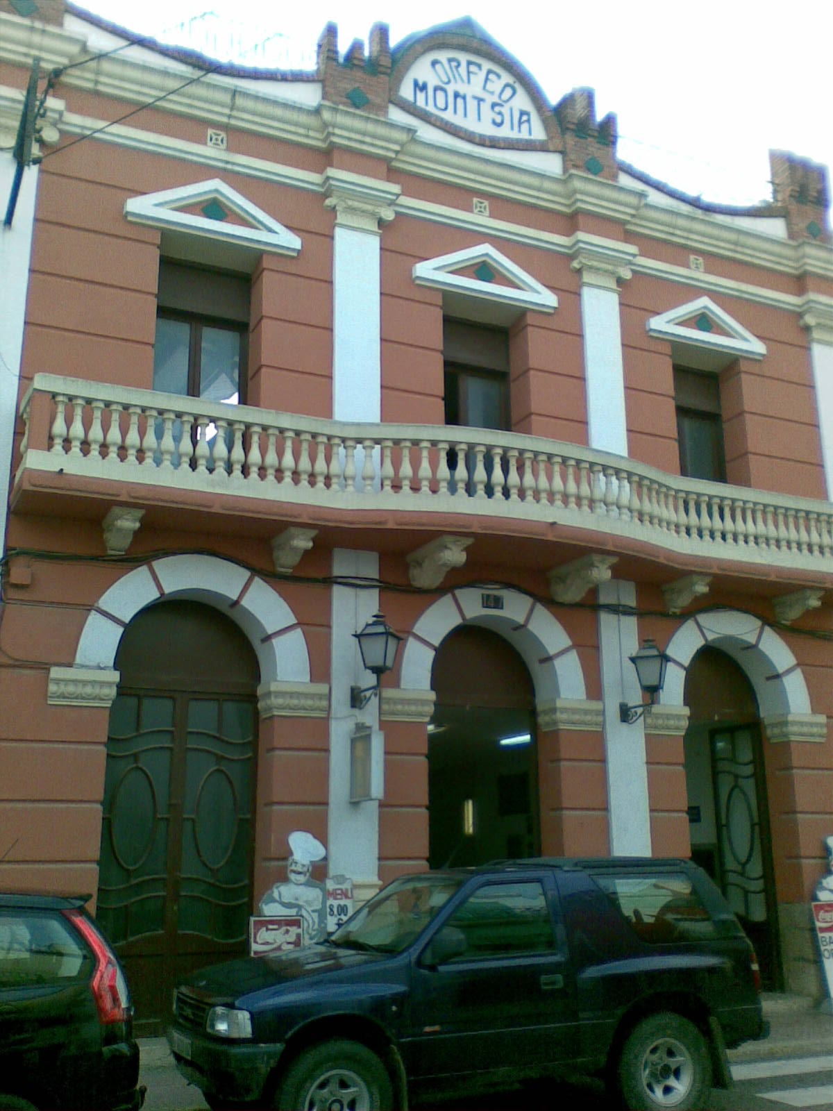 L'Orfeó Montsià (Ulldecona, comarca del Montsià).